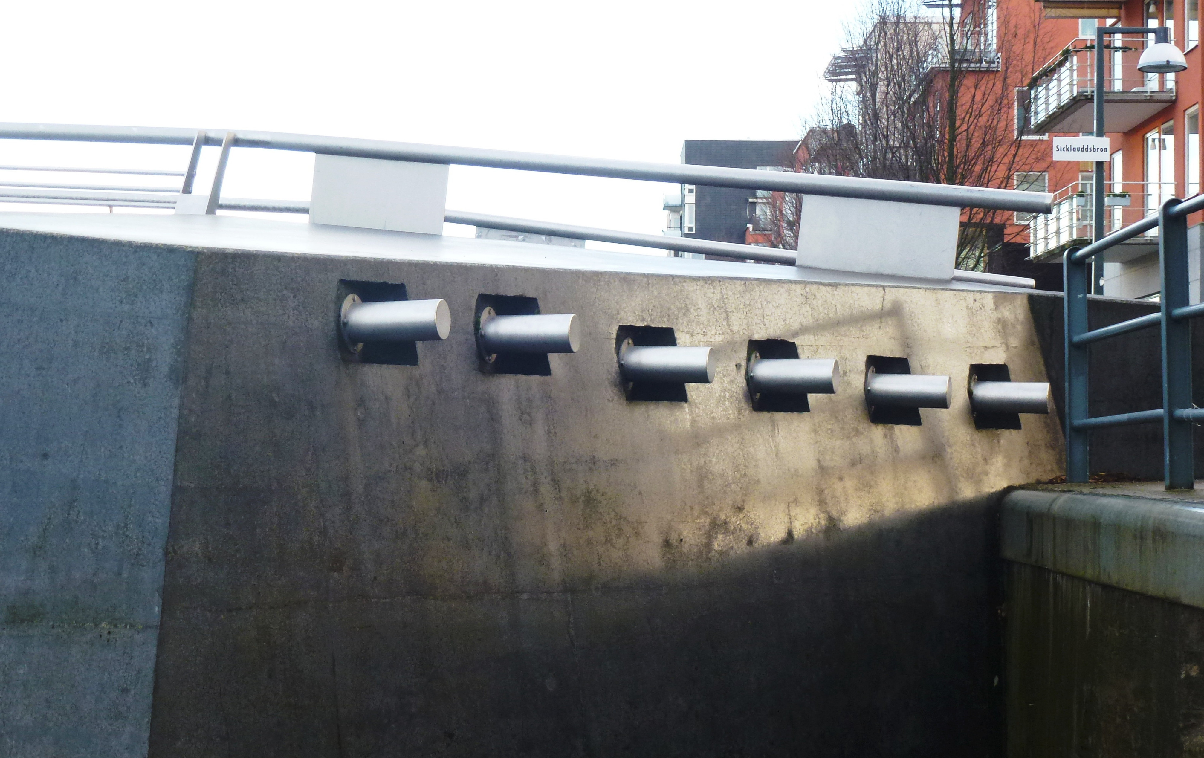 Sicklauddsbron, spännarmeringen är infäst i södra sidans tunga konstruktion